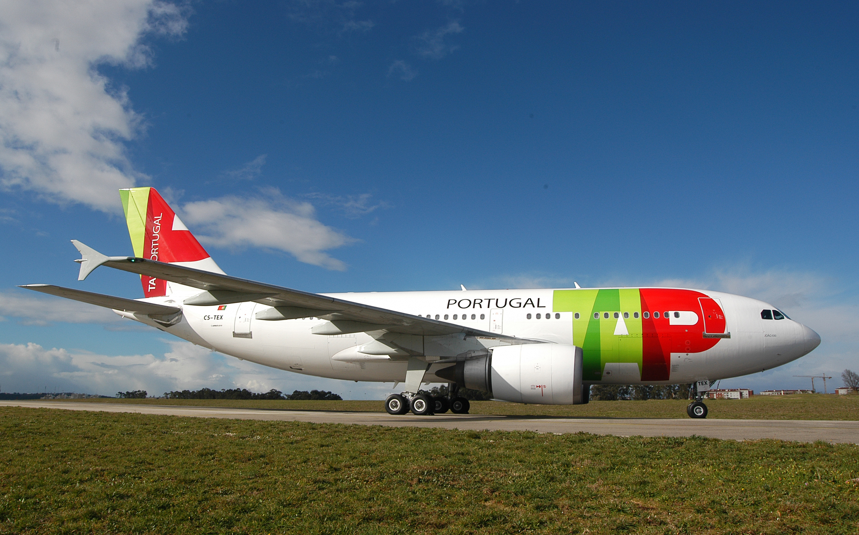 A310 der TAP auf der Startbahn